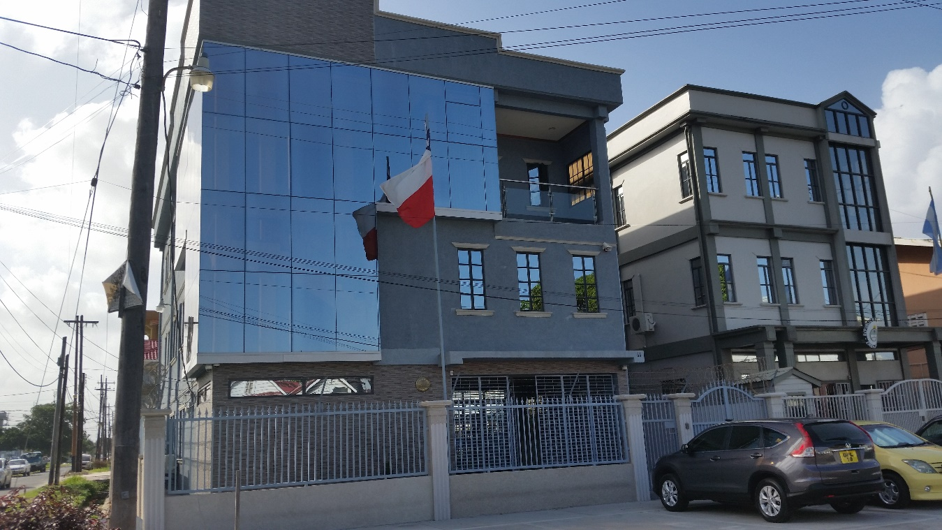 Embajada de Chile y Argentina en Guyana